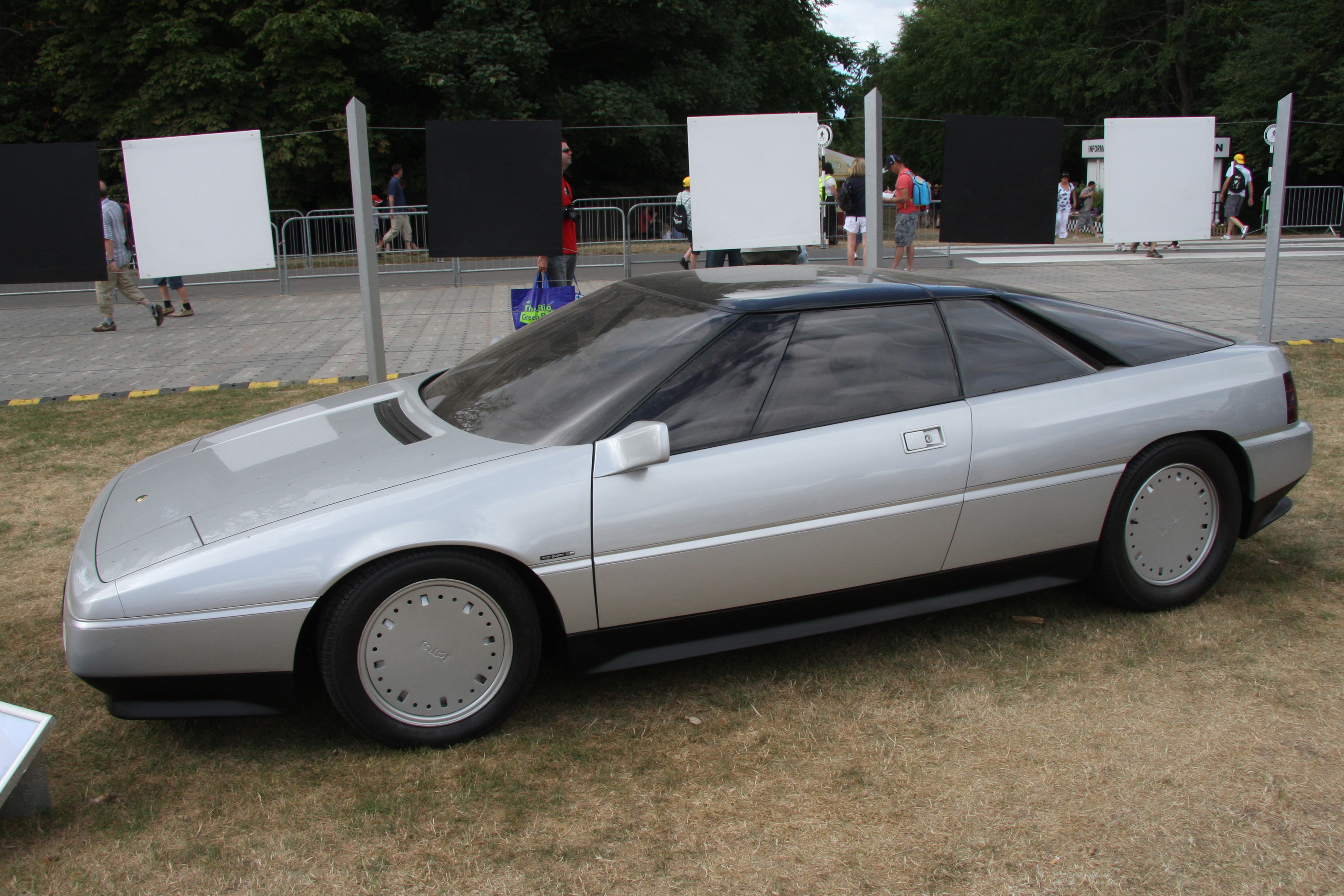 1984 Lotus Etna